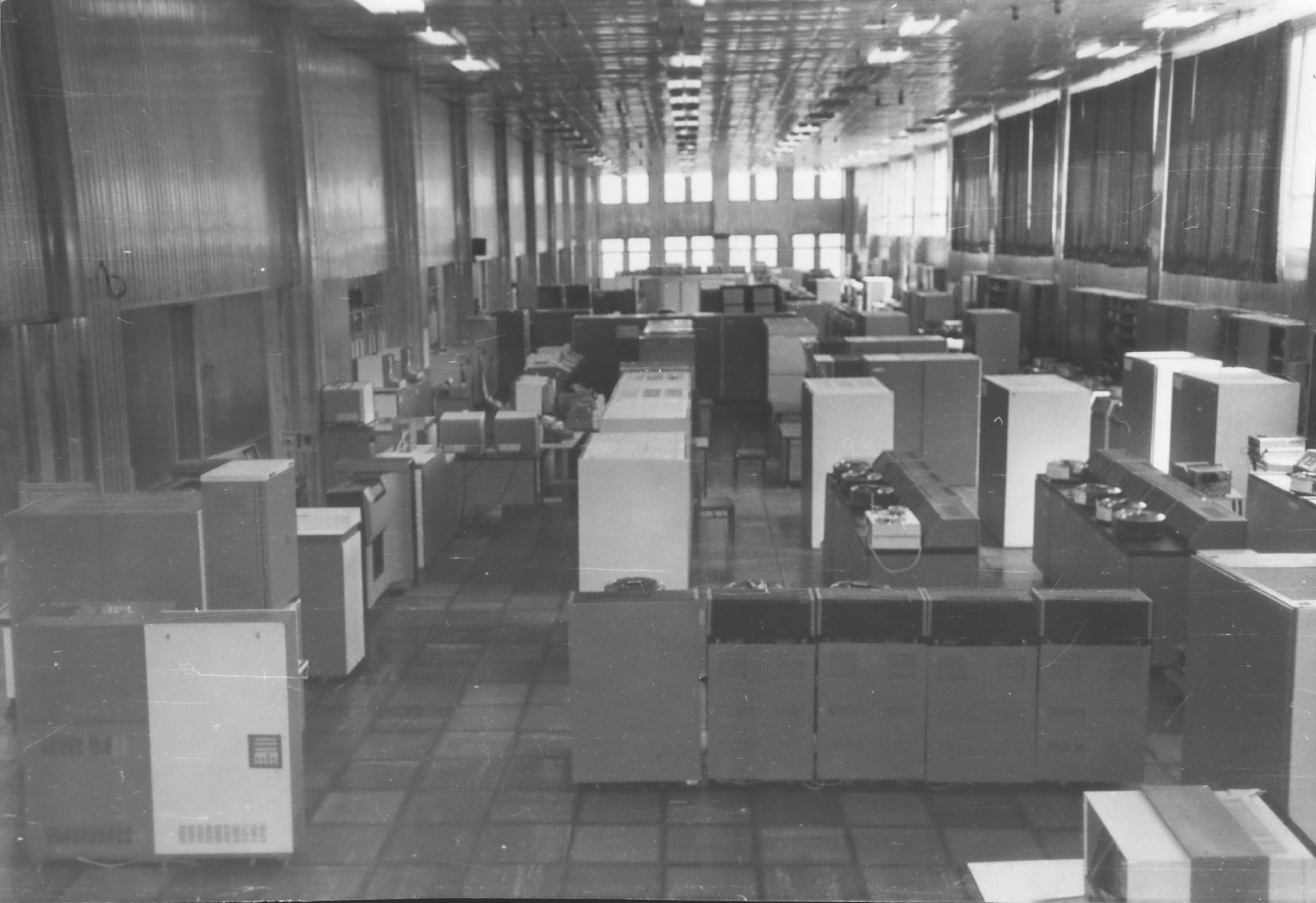 Вычислительный Центр коллективного пользования ИАПУ ДВО РАН Владивосток